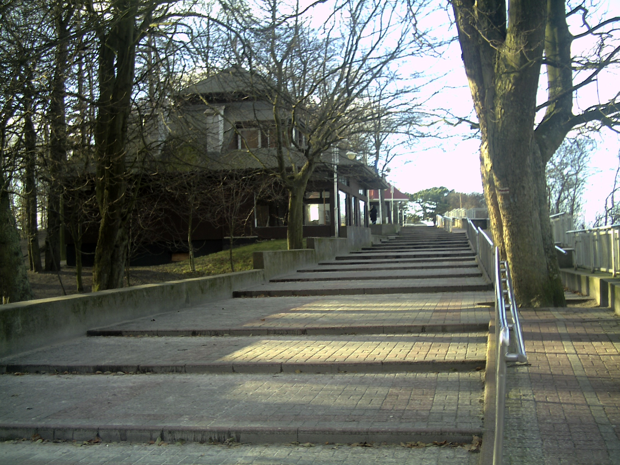 Ustka, promenada